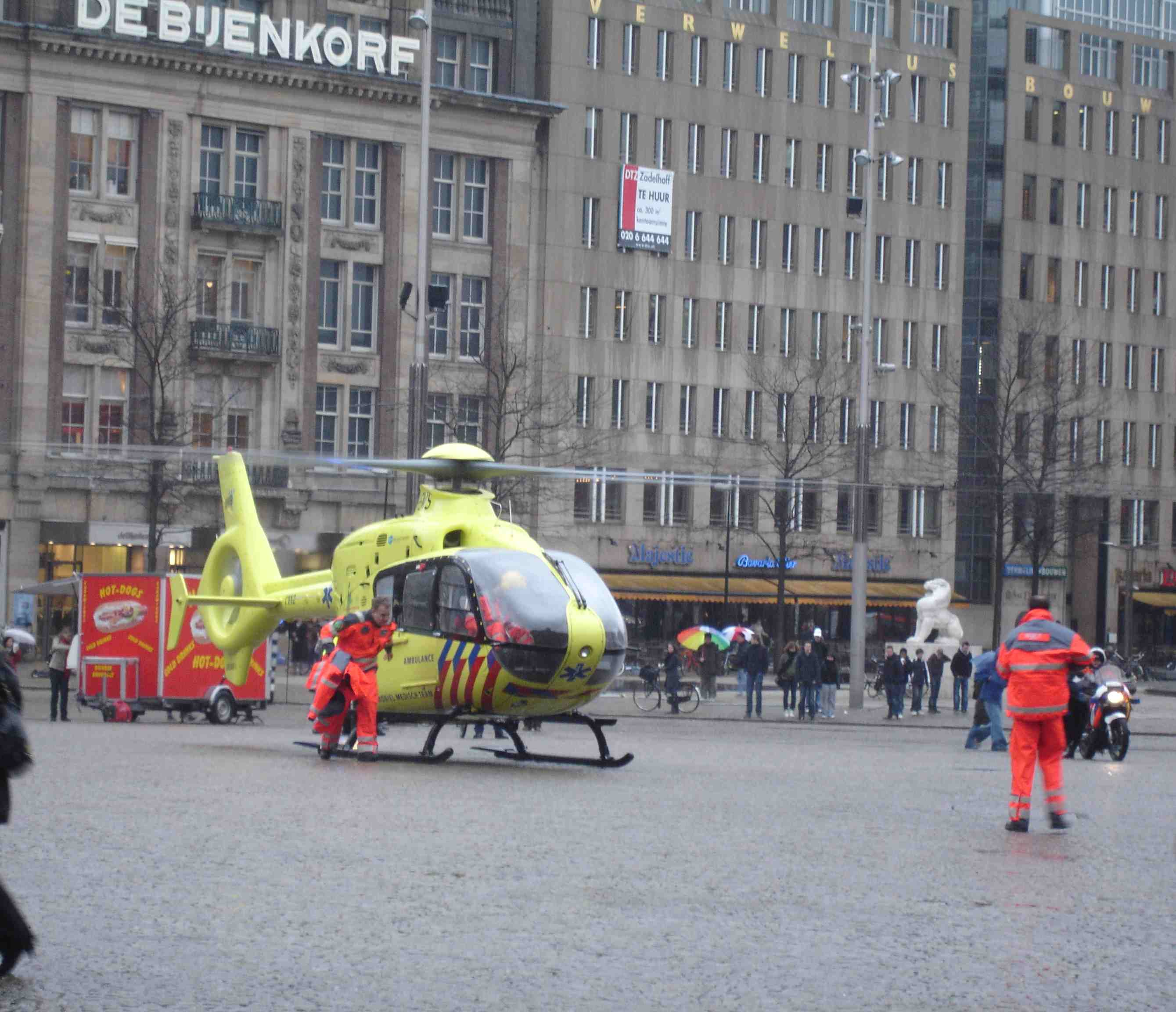 Ambulance helicopter in Amsterdam (Mobiel Medisch Team)